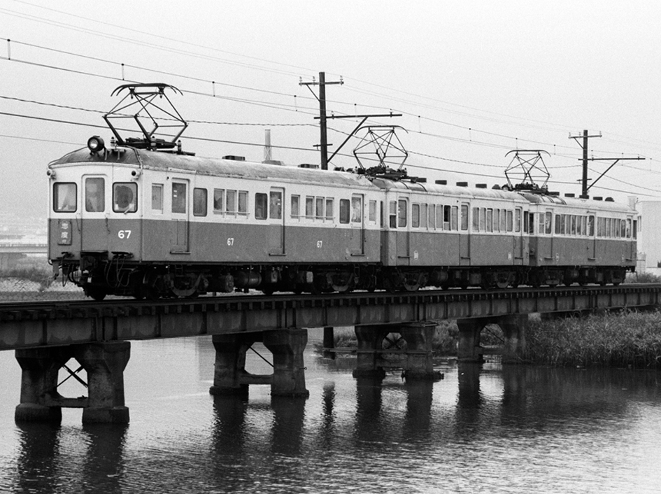 高松琴平電鉄 60形67+1000形100＋3000形300